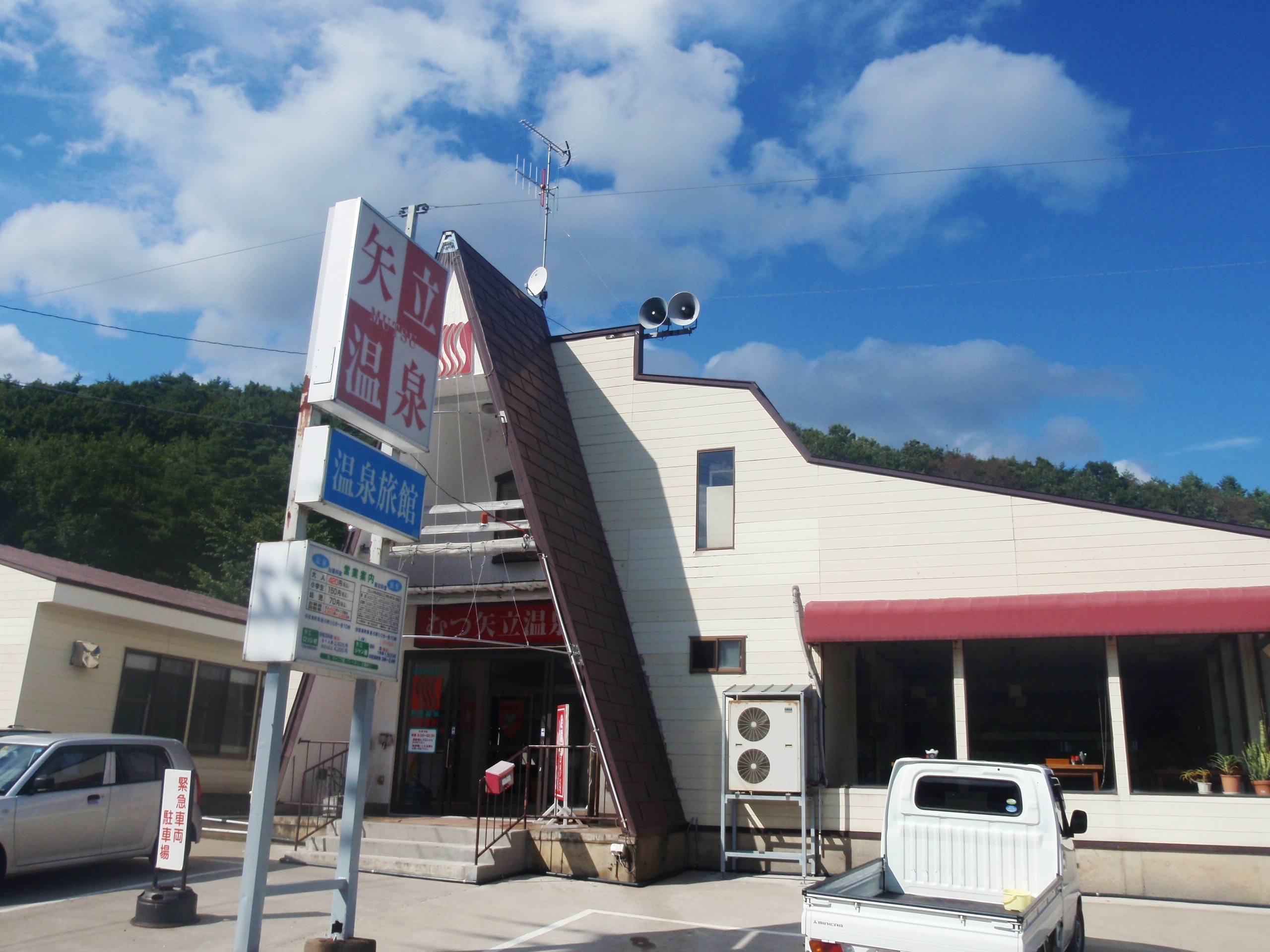 むつ矢立温泉